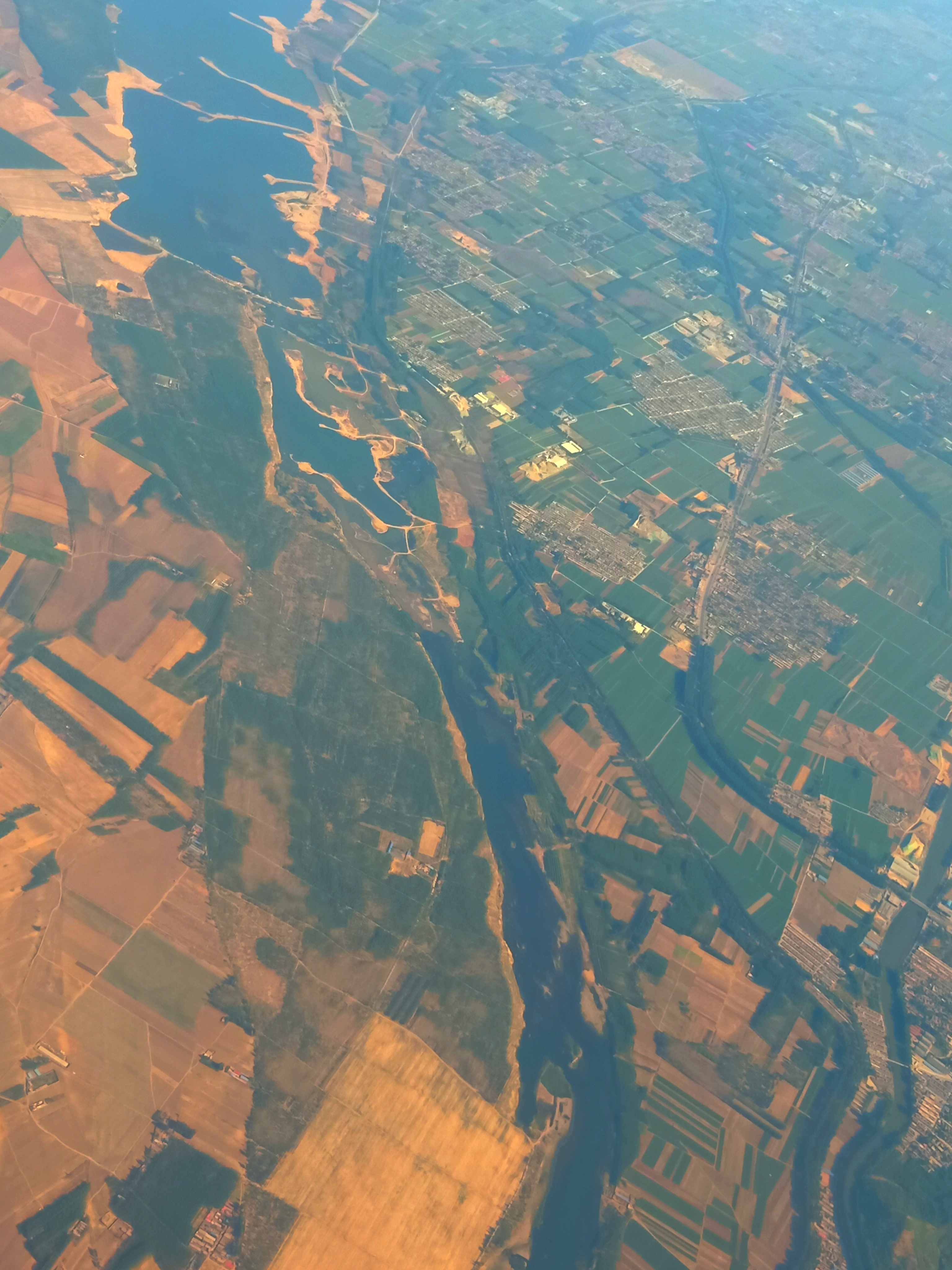 粵語: 喺上空睇灤河嗰邊